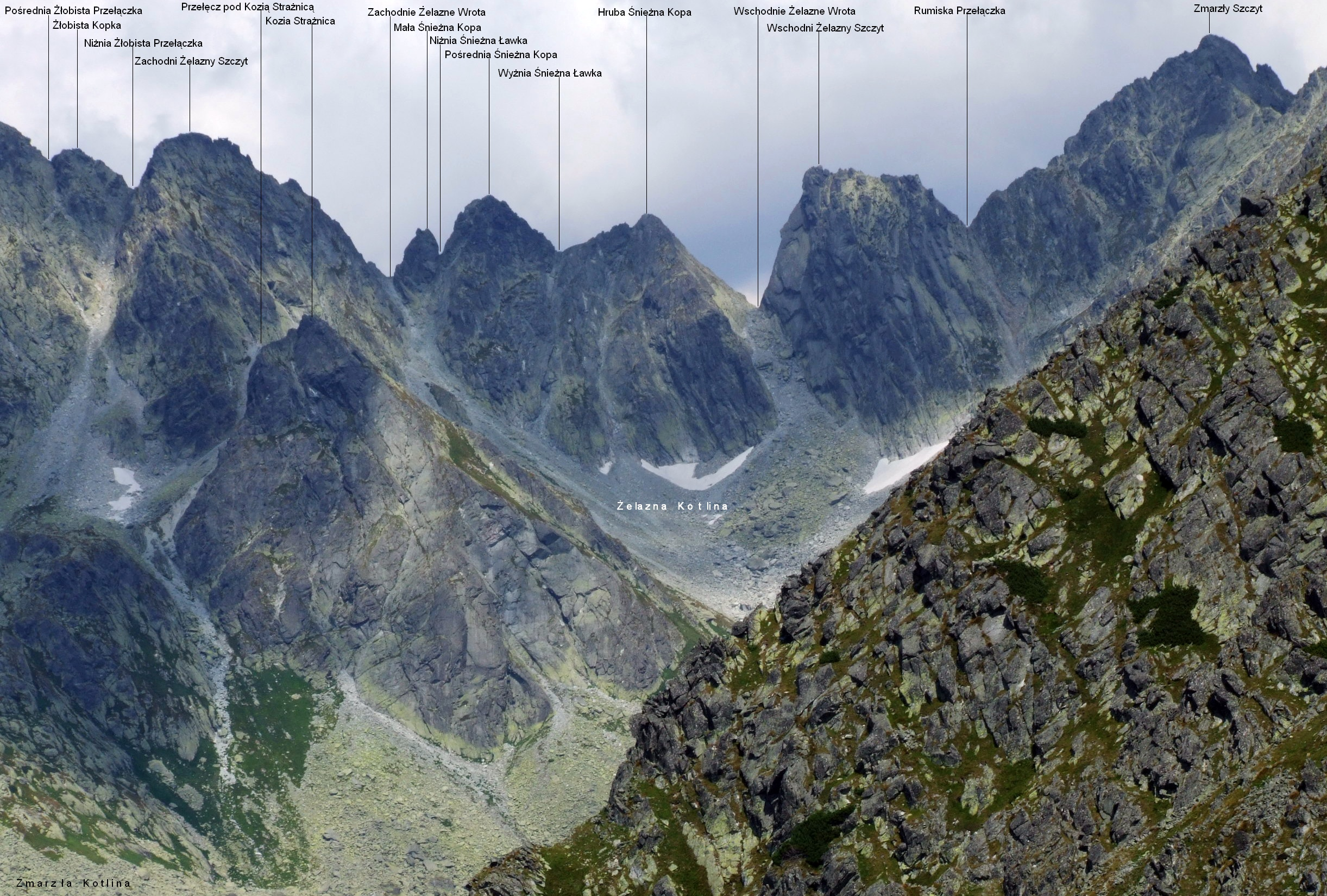 Widok na grań główną Tatr i Dolinę Złomisk z podejścia na przełęcz pod Osterwą